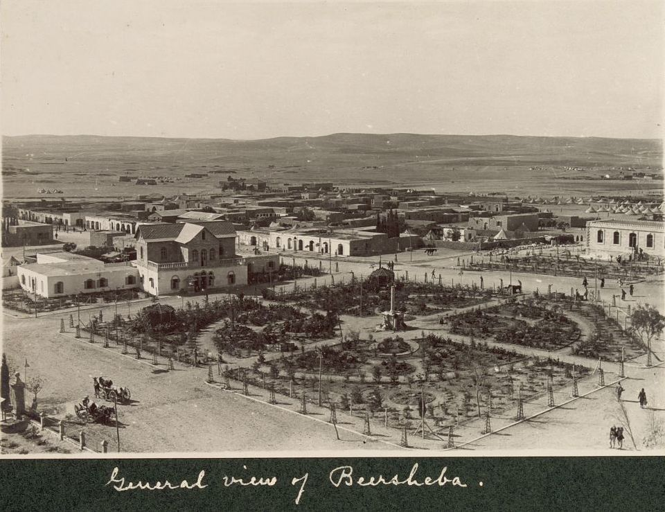 באר שבע בתקופת מלחמת העולם הראשונה Beer Sheva at WWI